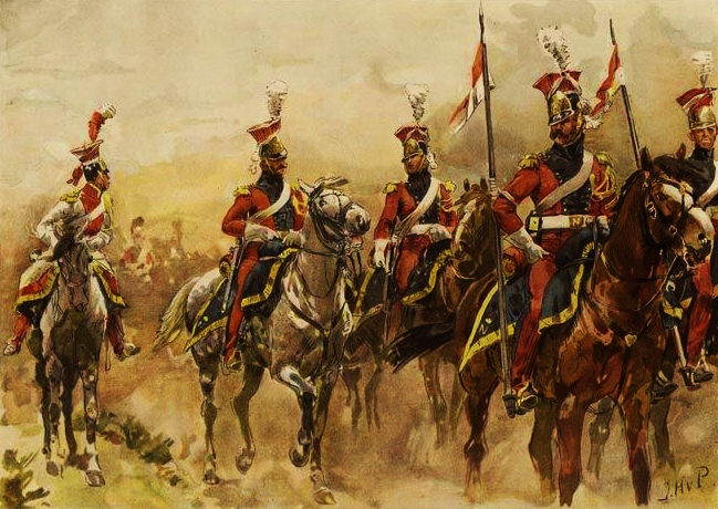 Lanciers rouges de la Garde impériale en route. A gauche, un trompette.